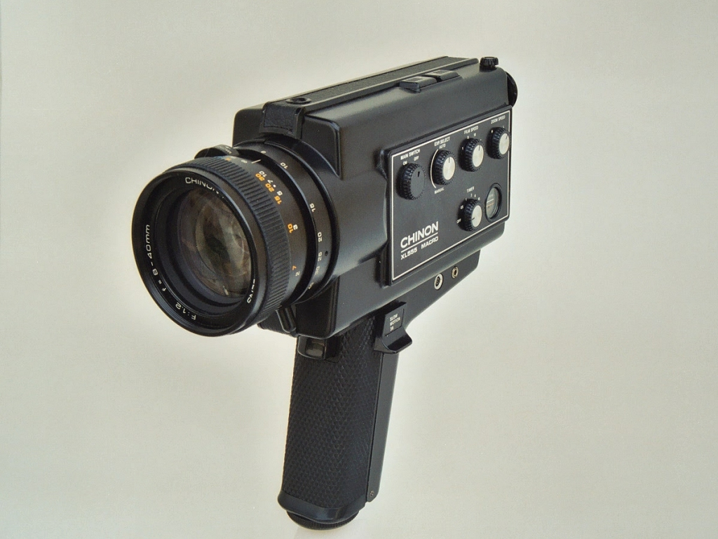 A Chinon XL 555 Macro film camera.